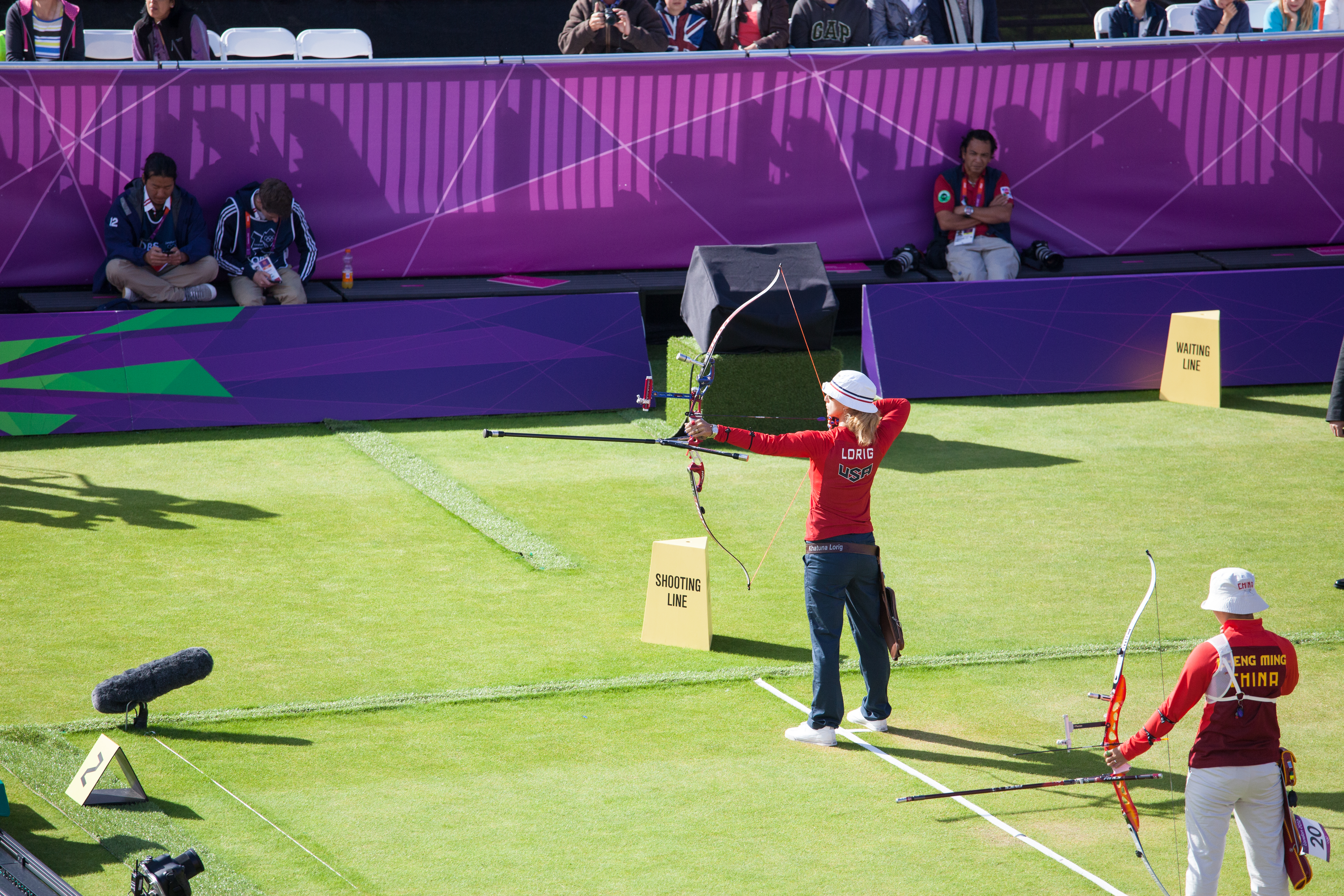 Khatuna Lorig and Cheng Ming